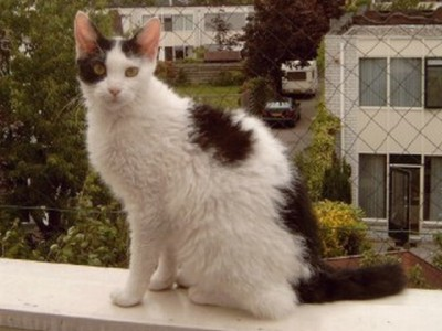 LaPerm cat